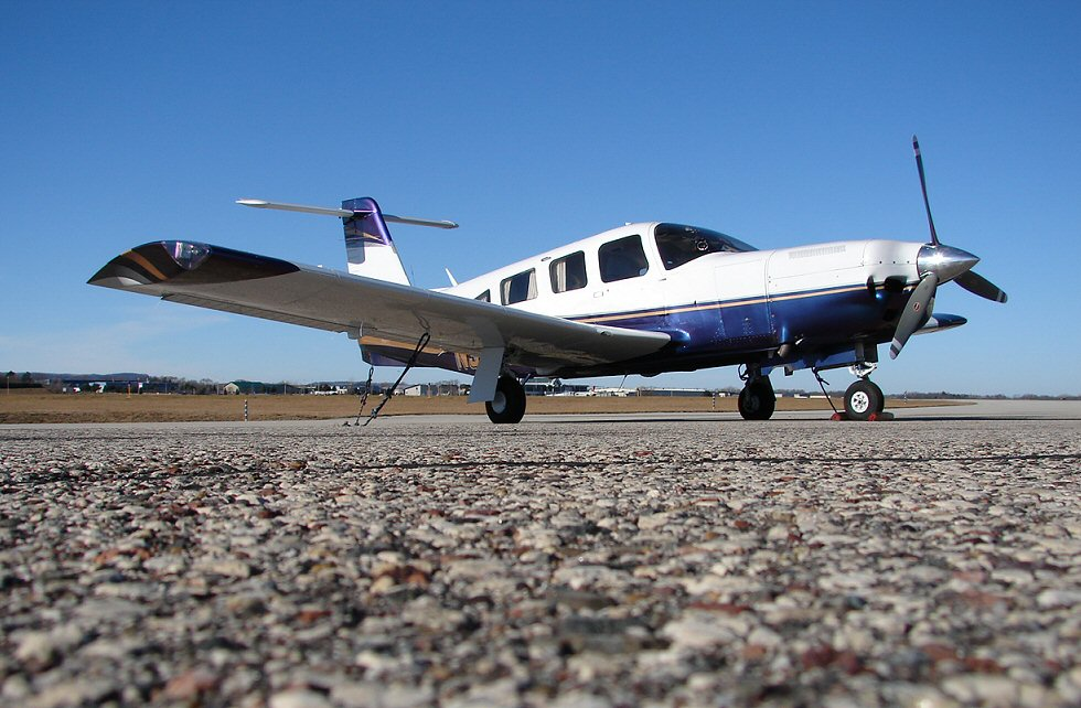 Piper Lance